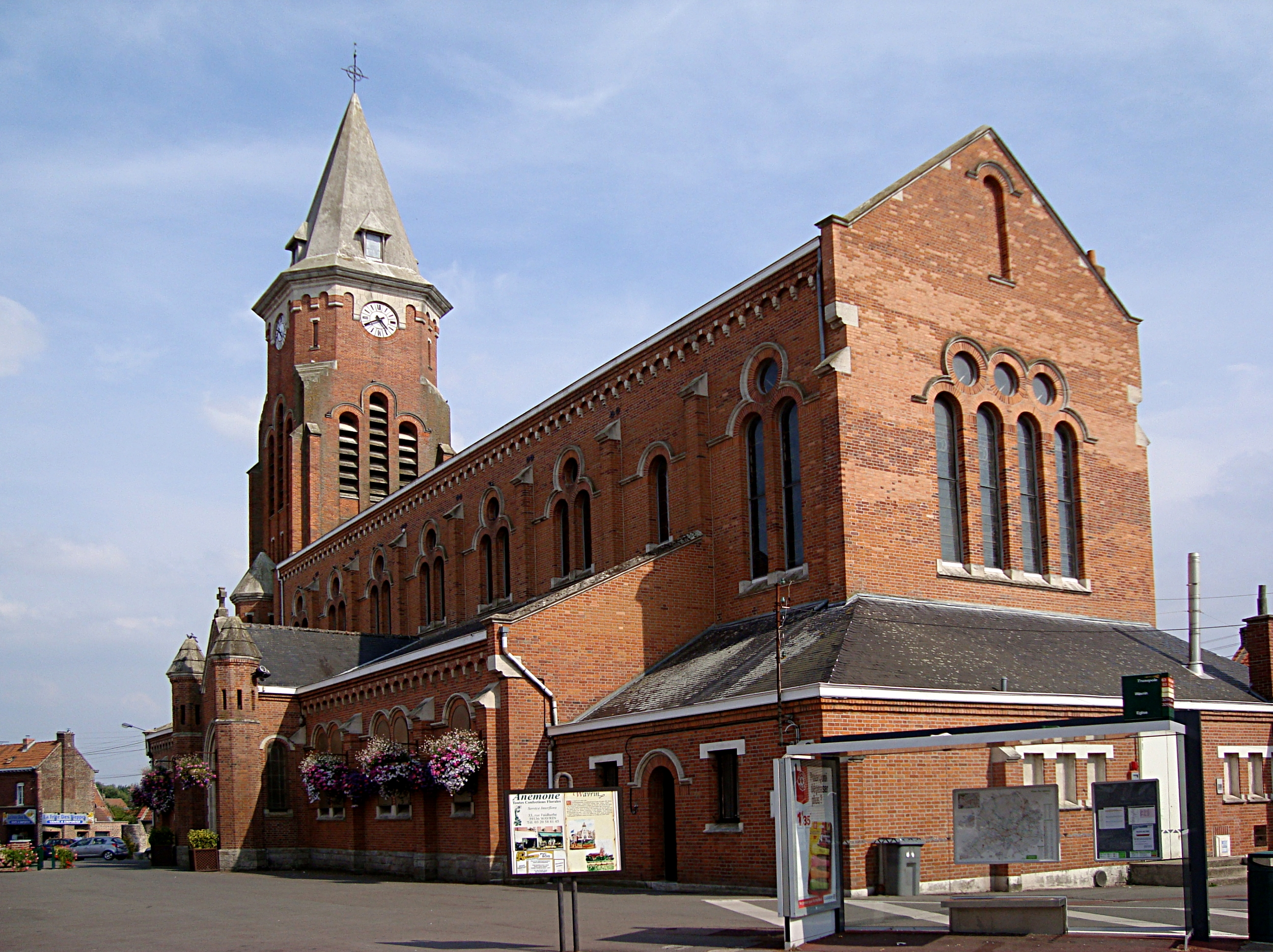 L'église Saint-Martin de Wavrin (Nord).